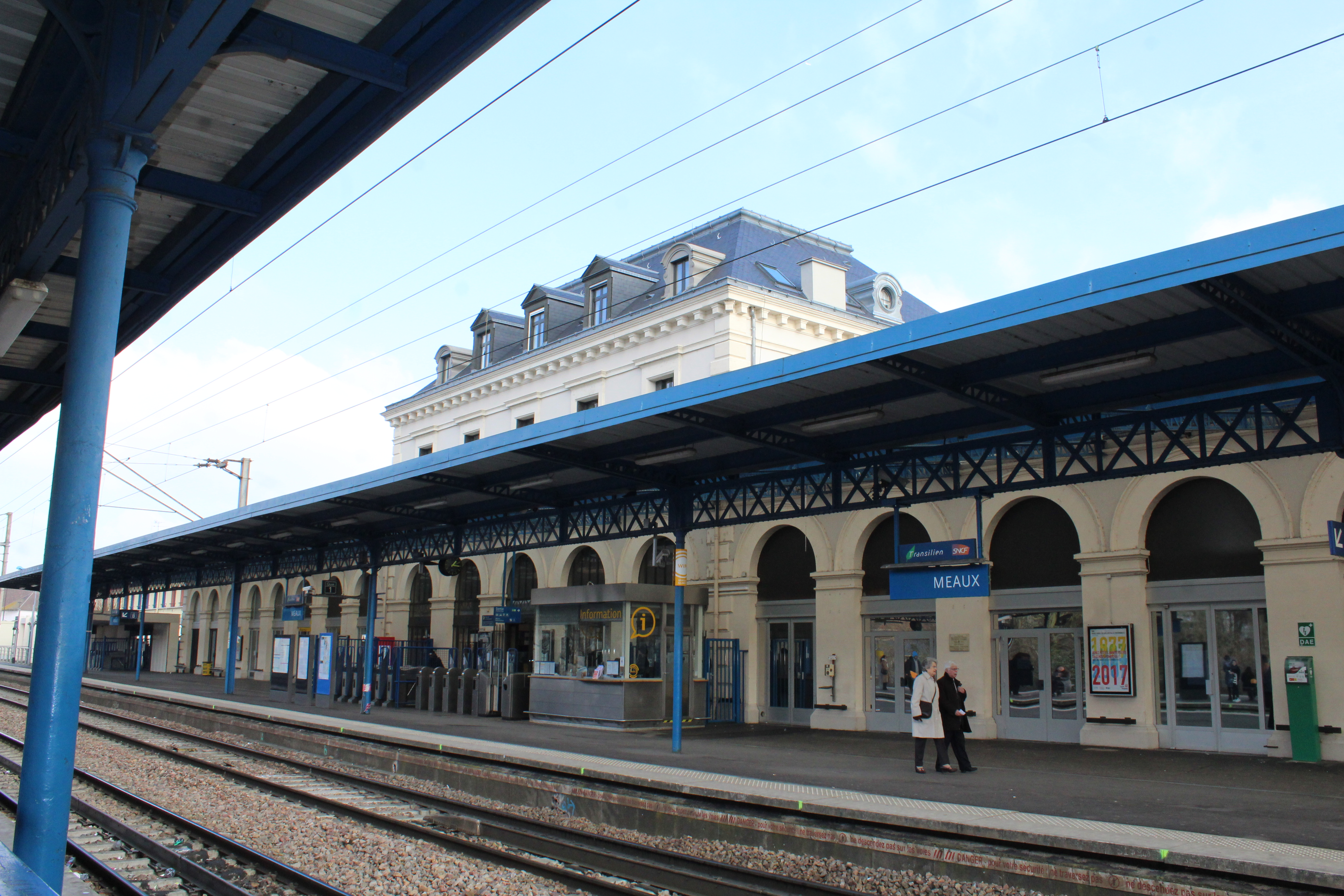 Gare de Meaux.